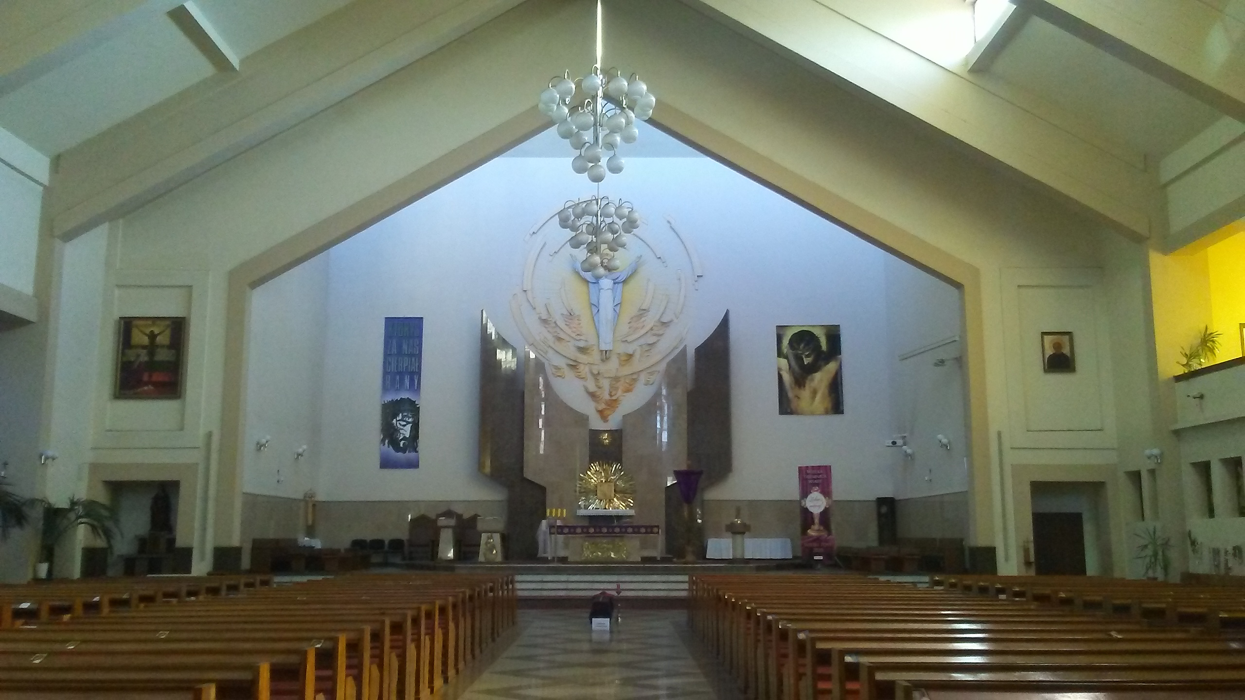 Wewnątrz kościoła rzymskokatoliskiego na osiedlu Niebrów w Tomaszowi Mazowieckim